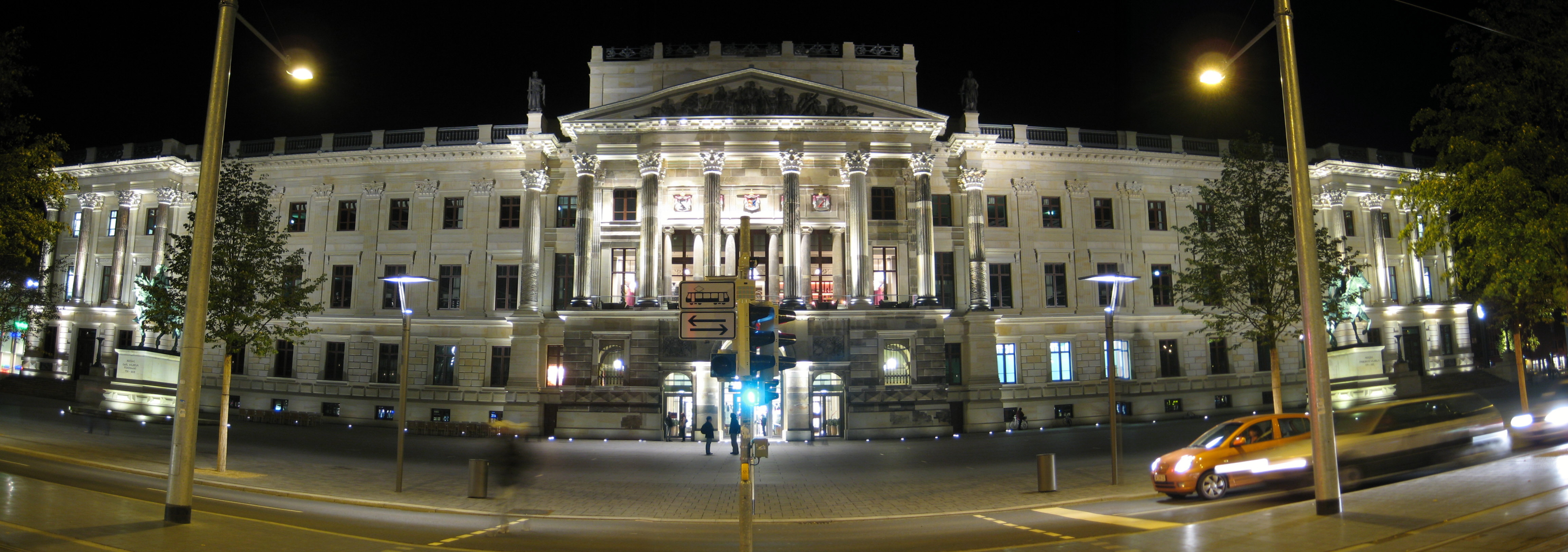 Braunschweiger Schloss nachts frontal gesehen, aus drei Einzelbildern zusammengestitcht